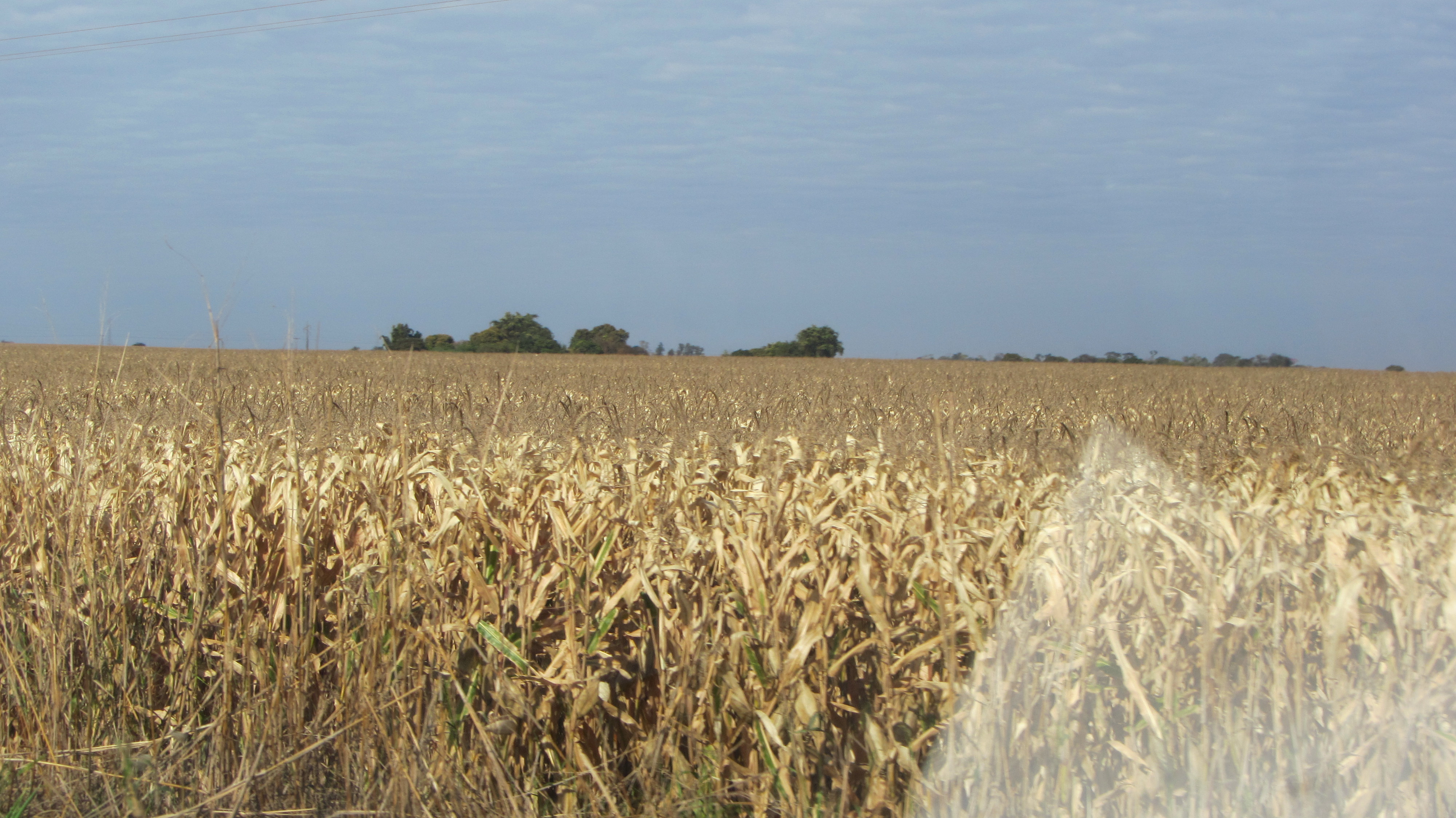 Rota Alternativa Paraguai - Rio Preto - 2